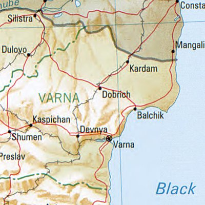 Lage der Städte Baltschik und Dobritsch in Bulgarien